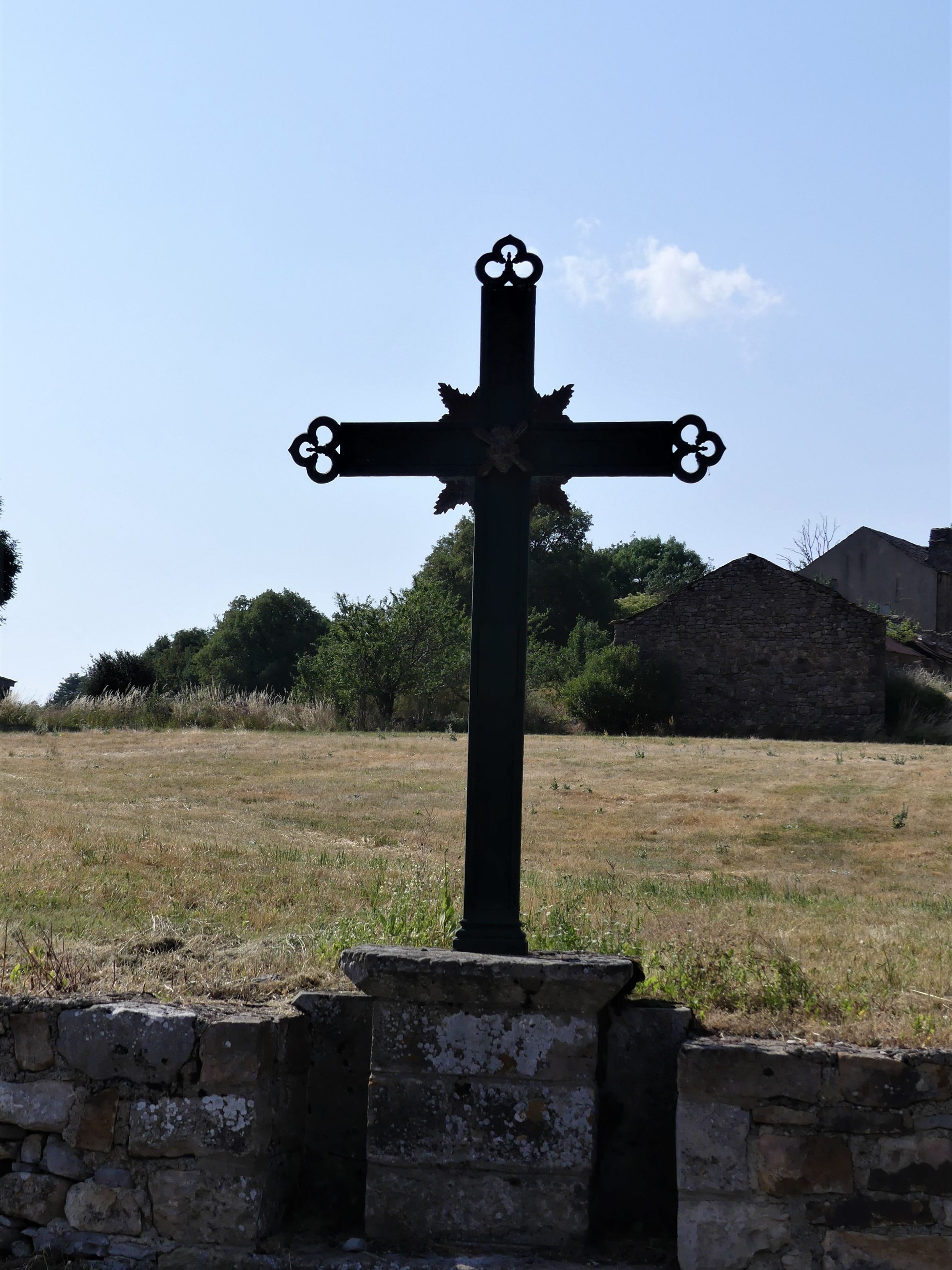 Croix de carrefour au village de Causse-Bégon, Gard, France.